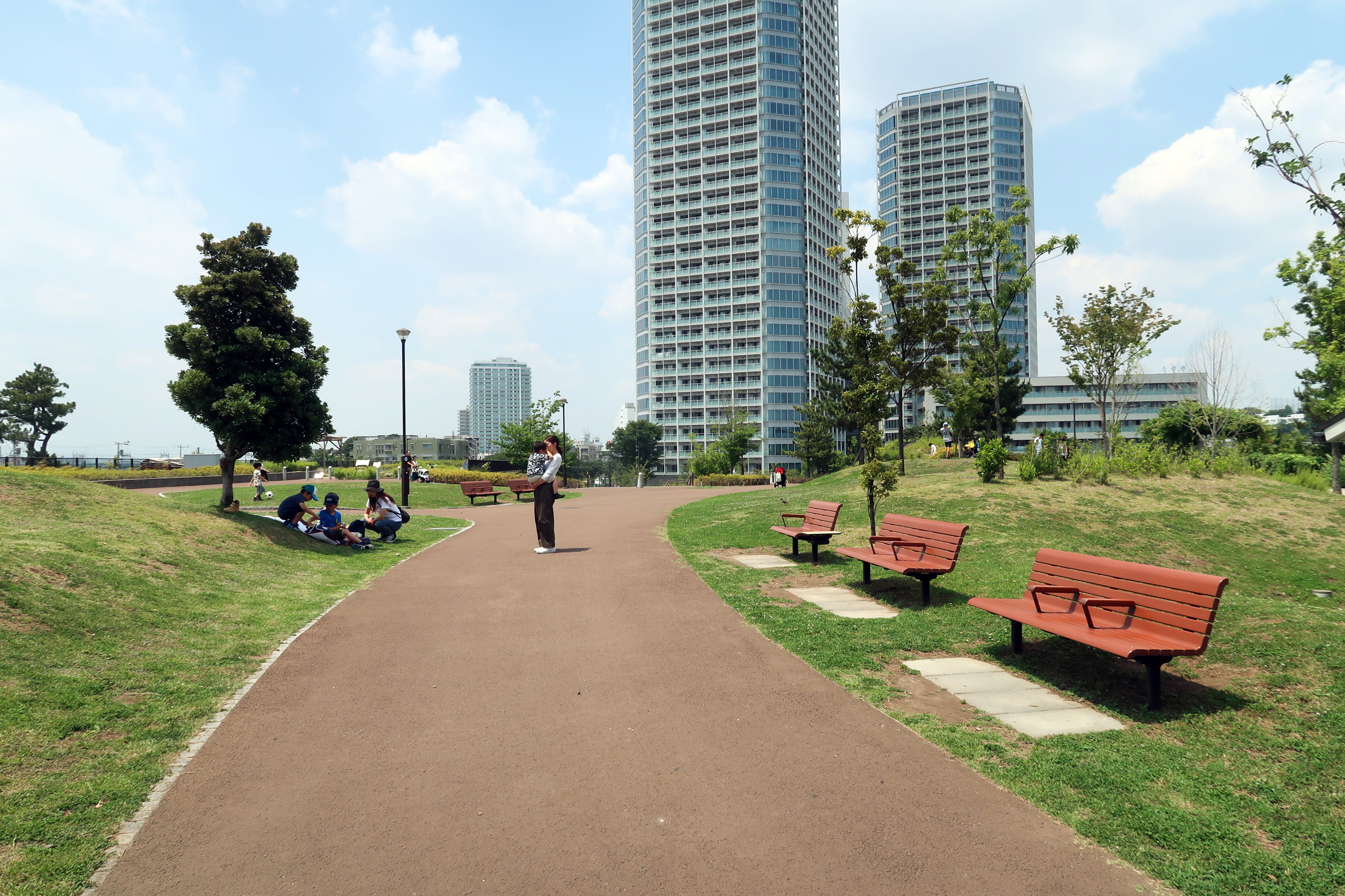 Futako-Tamagawa Park